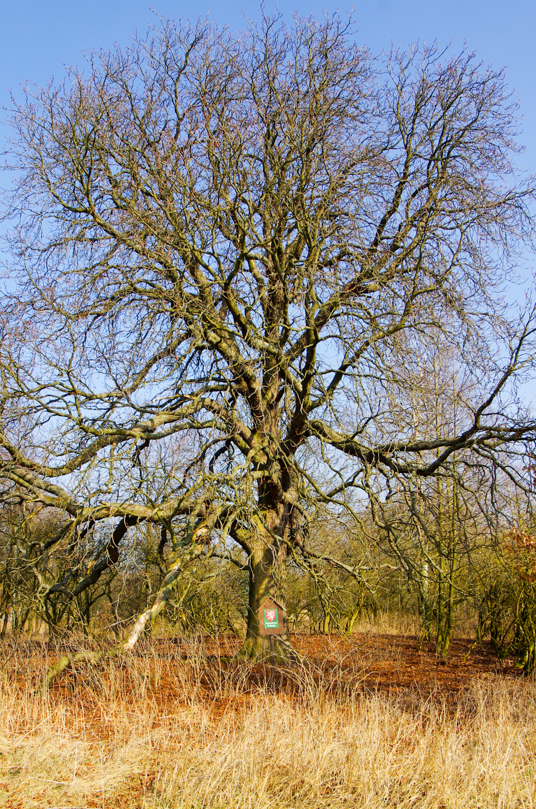 Památný strom kaštan v Markvarci, okres Sokolov